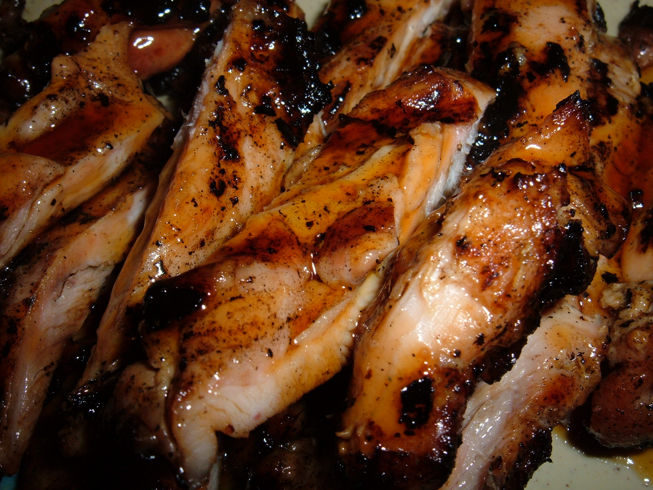 Chicken teriyaki